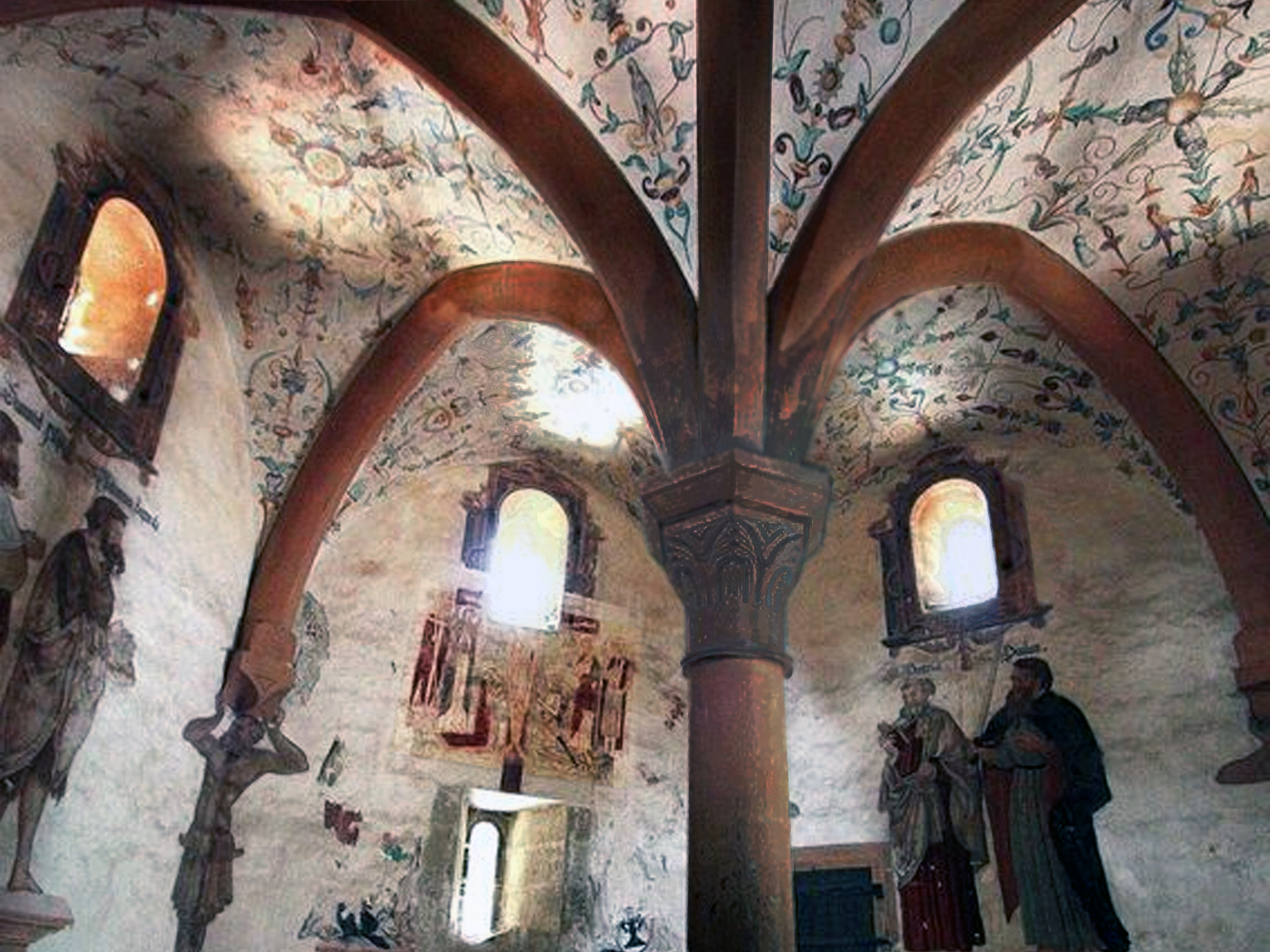 Эргардкапелла